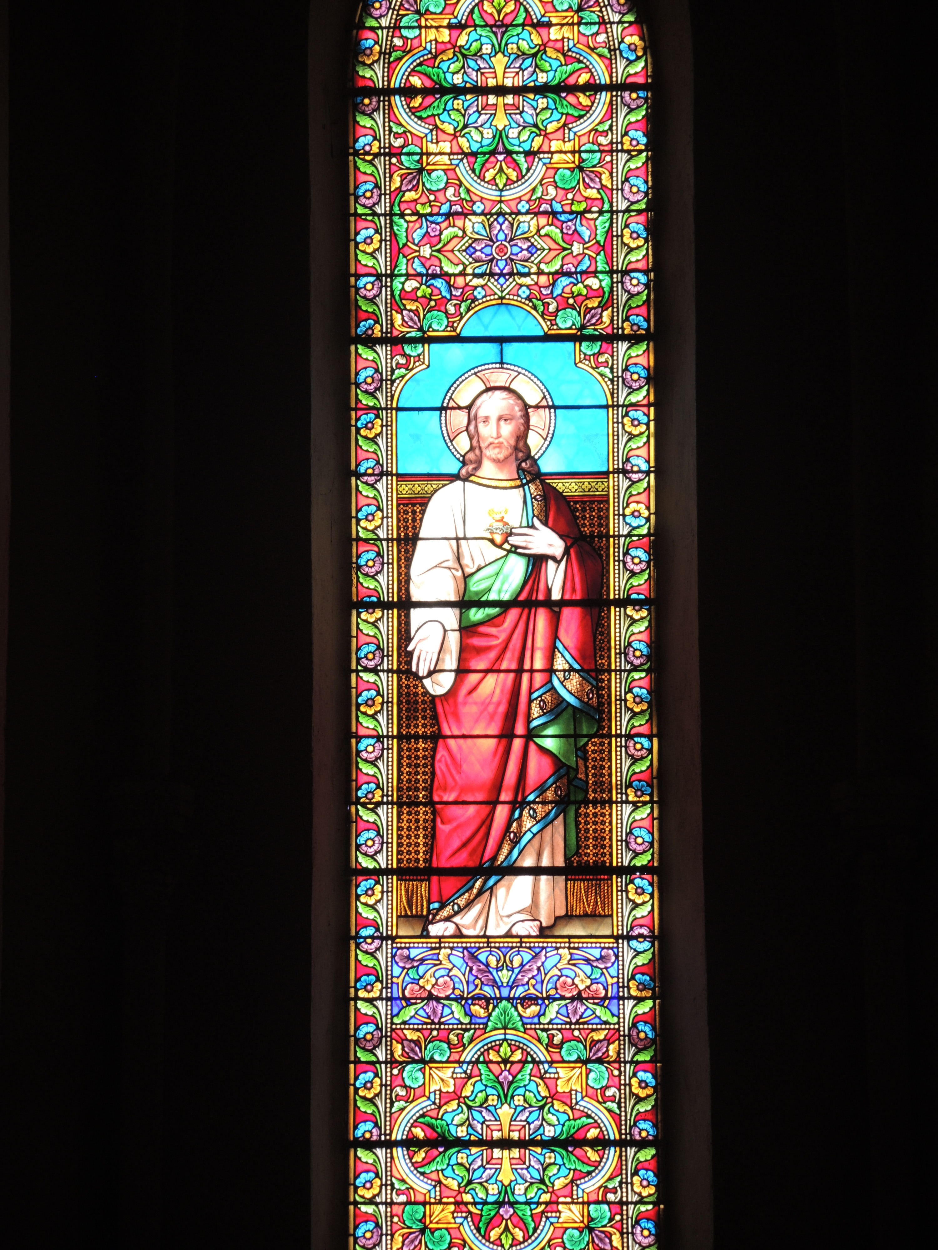 Saint-Alban d'Ay Vitrail